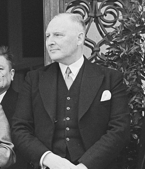 Collectie / Archief : Fotocollectie Anefo Reportage / Serie : [ onbekend ] Beschrijving : Installatie burgemeester Witschey in Alphen aan den Rijn burgemeester groep Datum : 18 april 1950 Locatie : Alphen aan den Rijn, Zuid-Holland Trefwoorden : BURGEMEESTER, Installatie Persoonsnaam : Witschey Fotograaf : Noske, J.D. / Anefo Auteursrechthebbende : Nationaal Archief Materiaalsoort : Glasnegatief Nummer archiefinventaris : bekijk toegang 2.24.01.09 Bestanddeelnummer : 903-9188